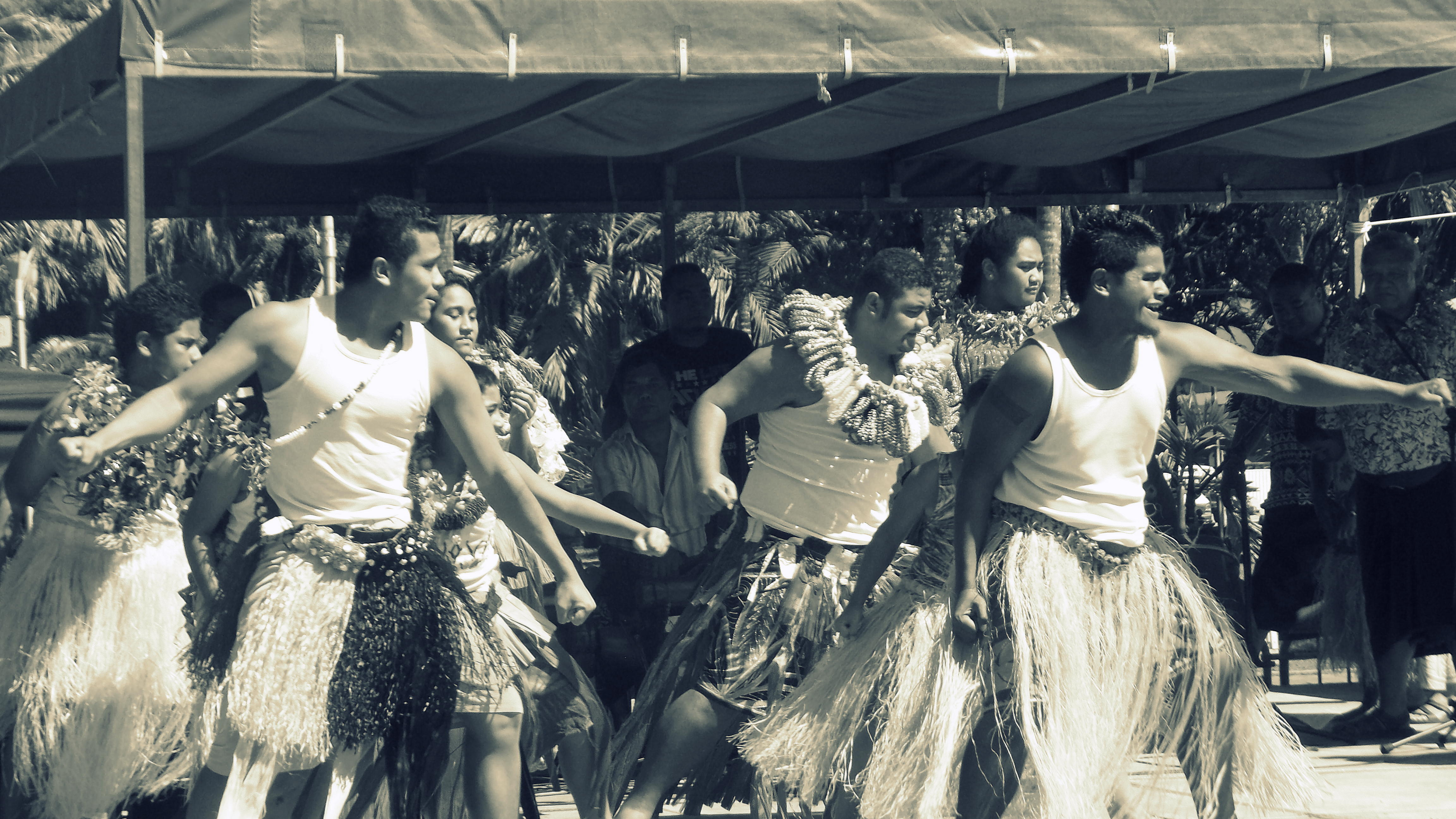 Danse wallisienne masculine (à identifier), exécutée par des Wallisiens et Futuniens de Nouvelle-Calédonie, à Nouméa. Tous les jeudis un groupe vient vendre ses produits et faire des démonstrations au centre ville. Traitement de l'image : N&B, puis un traitement croisé (mélange de bleu et jaune - 50%) puis réglage sur la balance des blancs